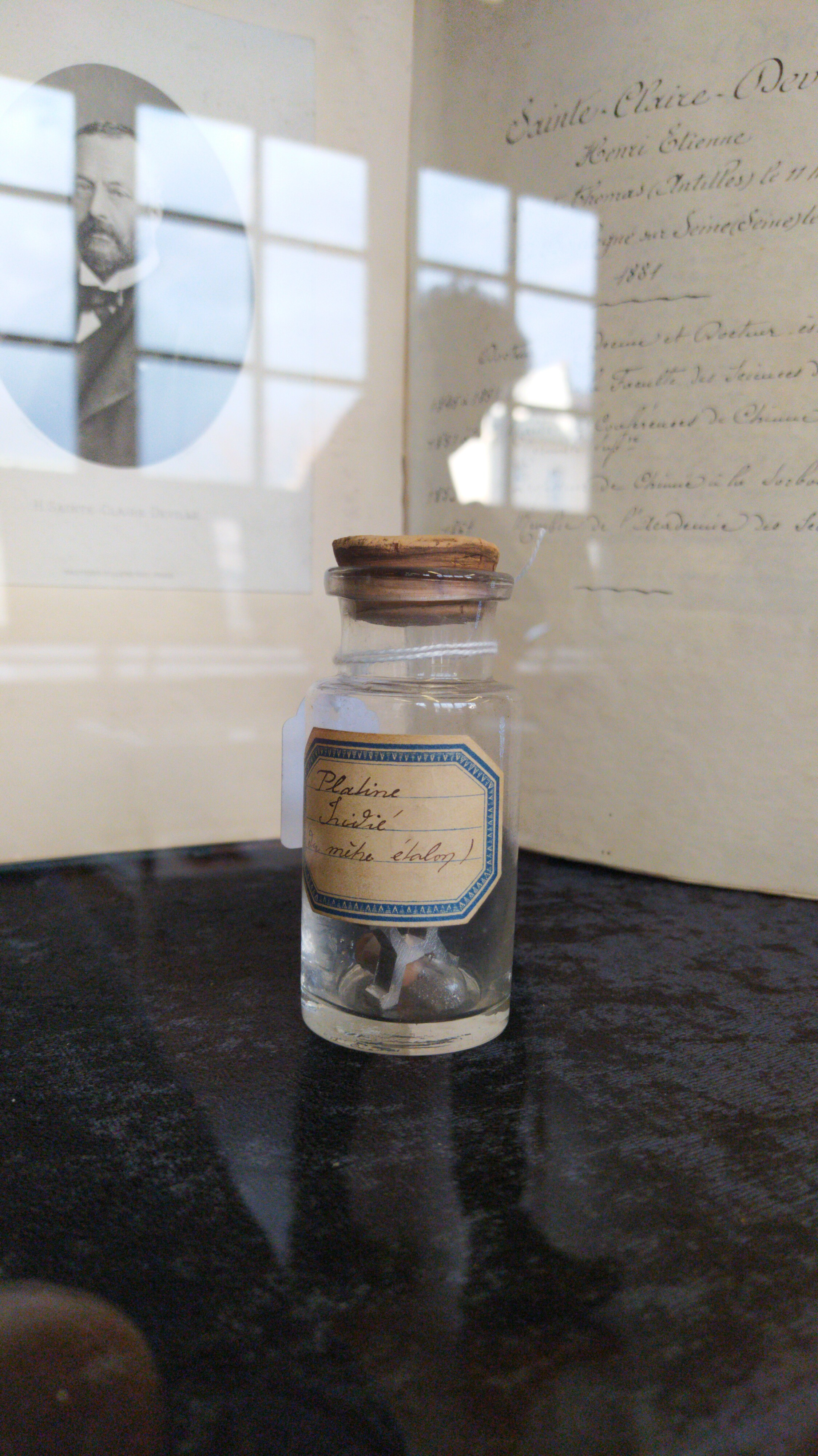 Échantillon du mètre étalon, issu de la collection du Département de Chimie de l'Ecole Normale Supérieure à Paris. L'échantillon a été réalisé par Henri Sainte-Claire Deville en platine iridié.